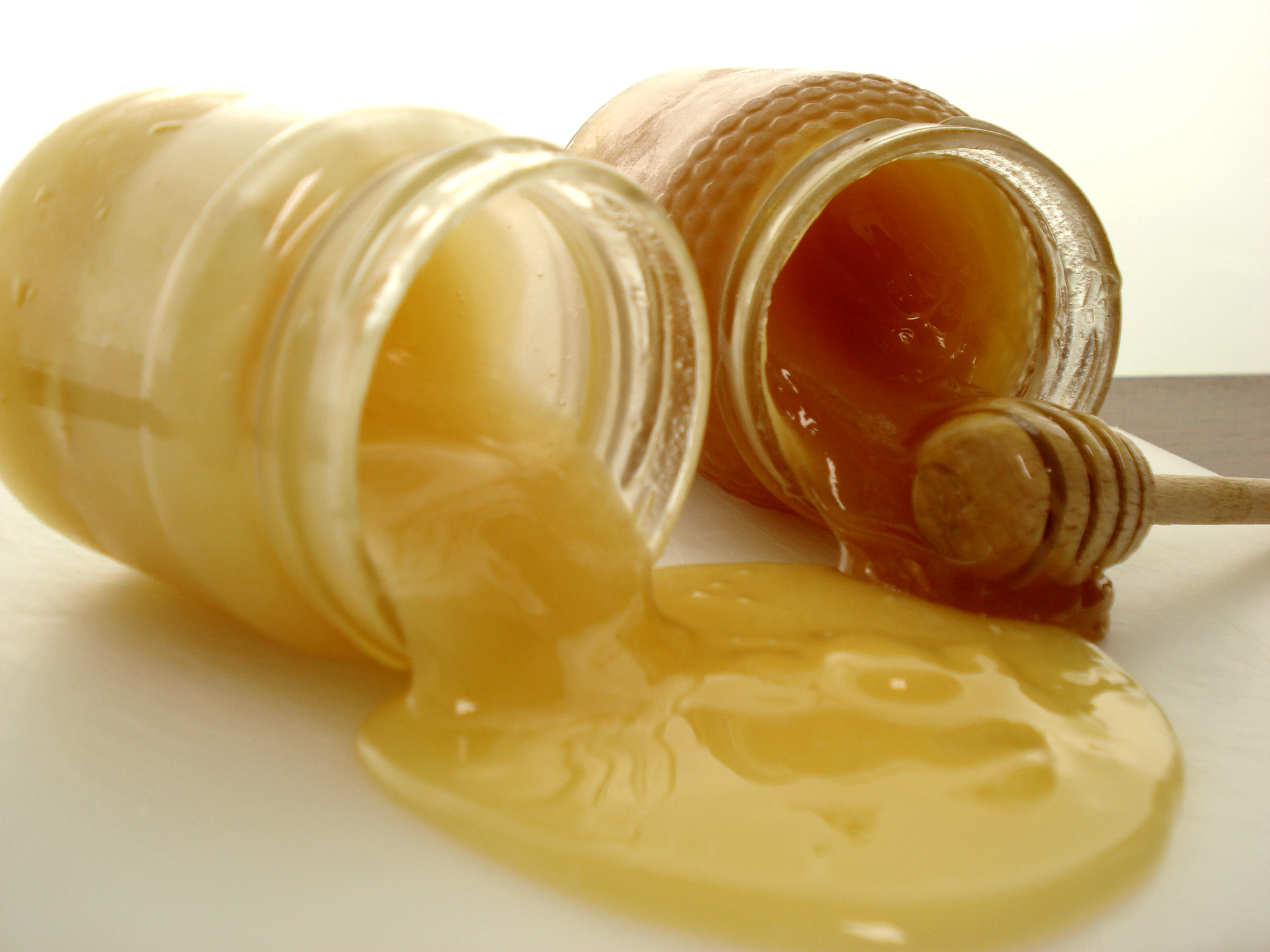 Envases de miel cristalizada derramados